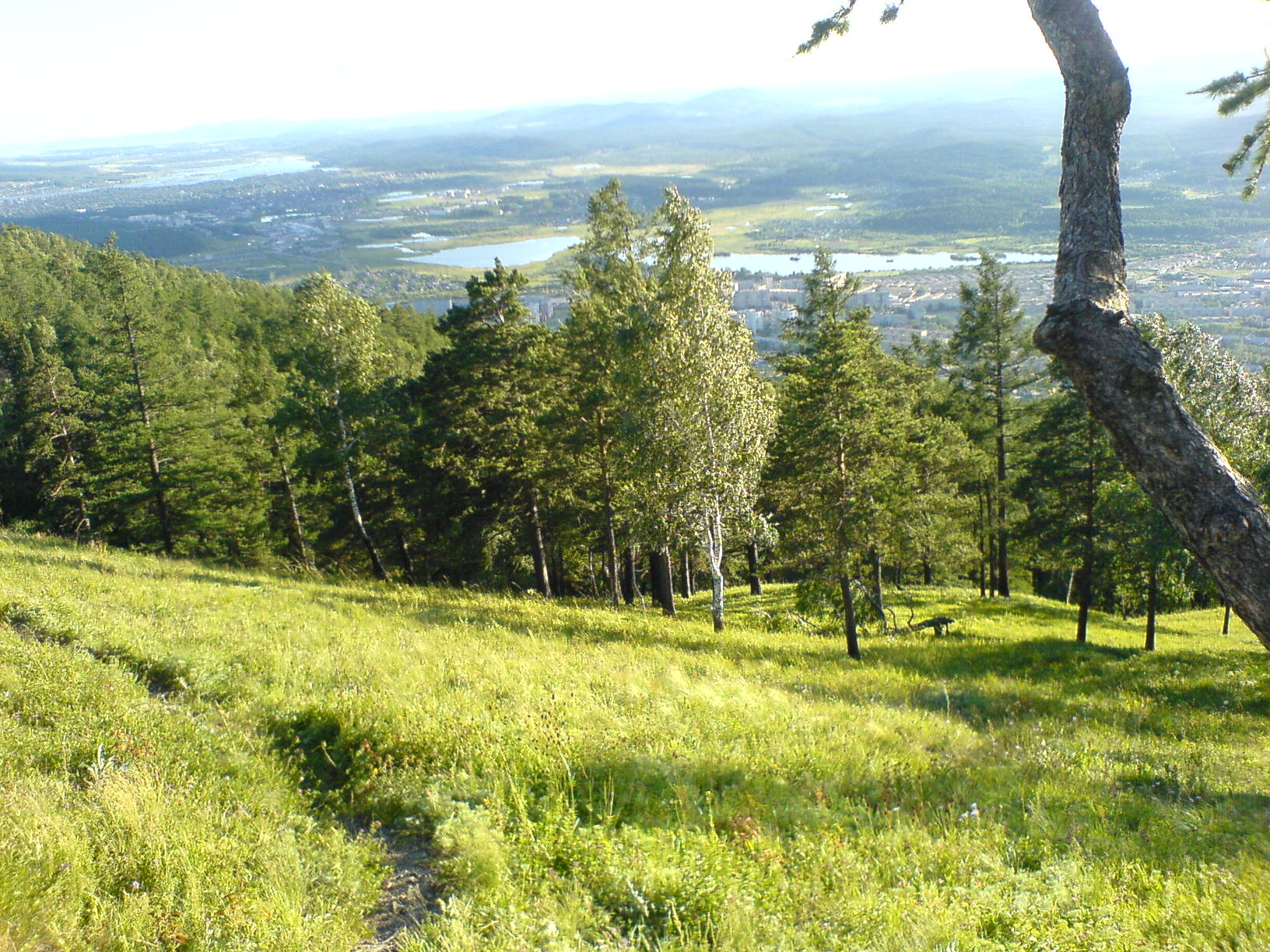 Южная часть Миасса с Ильменского хребта